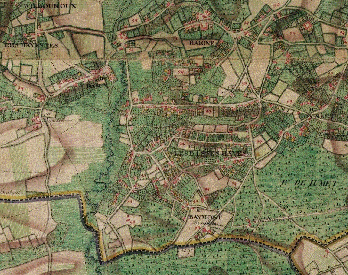 Roux (Charleroi - Belgique) - Les "Basses Haies" (la Bassée), Noyau originel de la localité selon André Herregods. Carte de Cabinet des Pays-Bas autrichiens La carte de Cabinet des Pays-Bas autrichiens a été levée sous la direction du comte de Ferraris entre 1770 et 1777. Il s'agit d'un document militaire réalisé en trois exemplaires et dont l'échelle originale est 1 / 11 520. La carte est entièrement manuscrite et procède de levers sur le terrain.